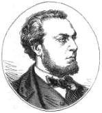 "M. Hérisson, maire du 6e arr."